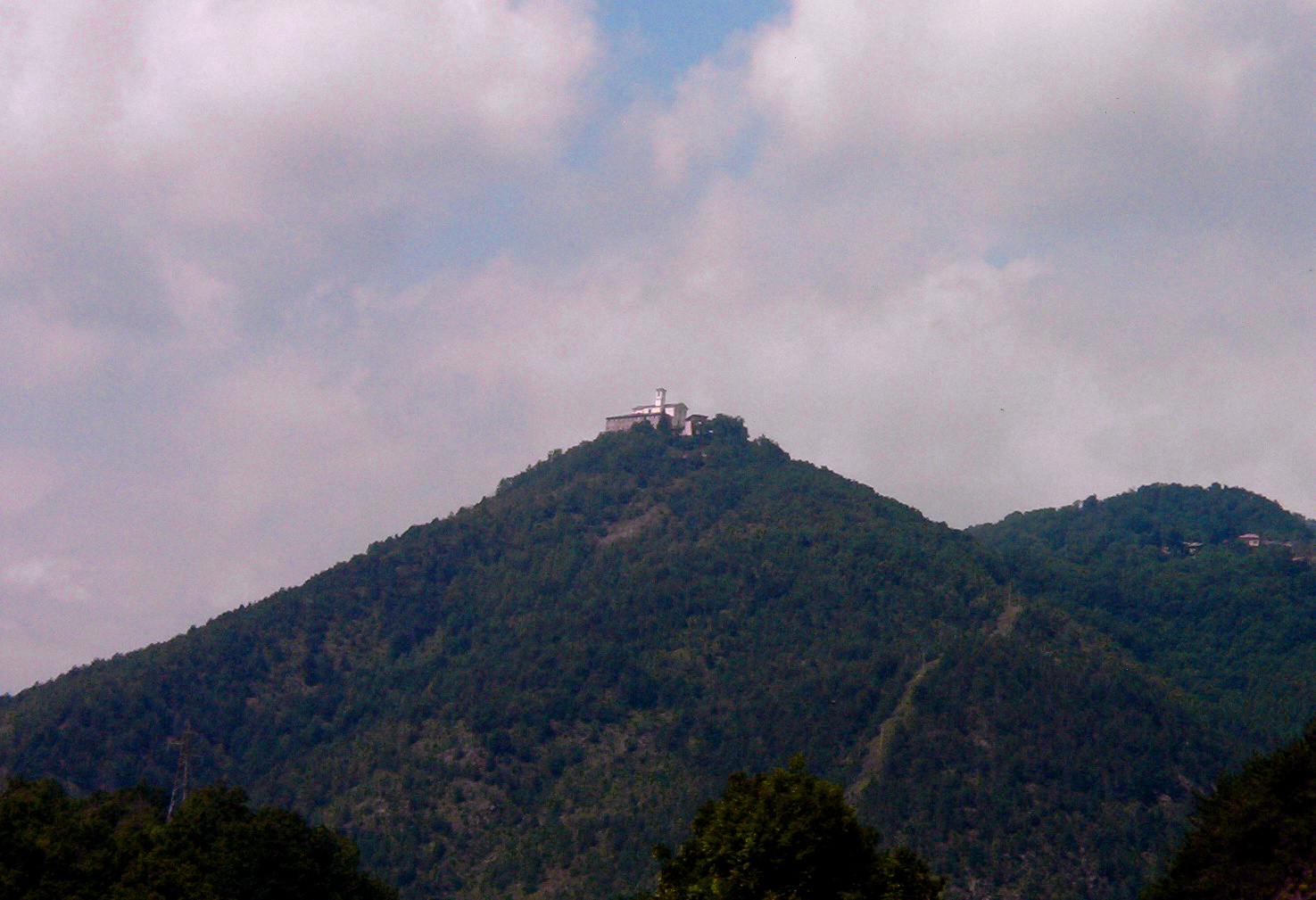 kirko Sankta Ignaco en Pessinetto, Italio